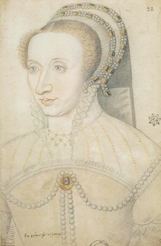 Marguerite de France, duchesse de Savoie